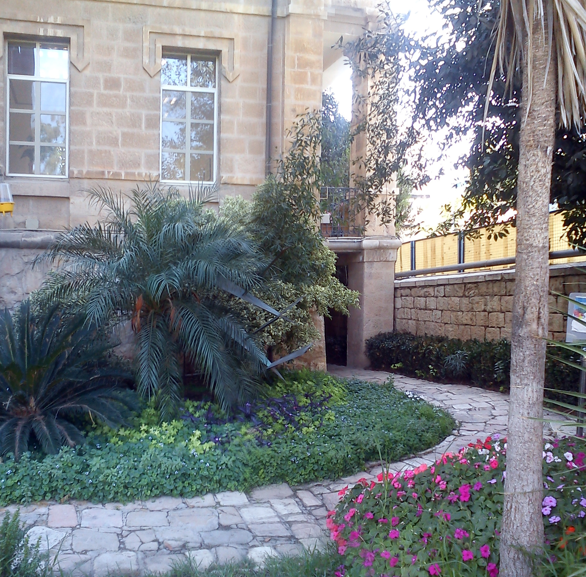 בית החולים מאיר רוטשילד הוא בית חולים יהודי מהראשונים שנוסדו בירושלים, ביוזמת הברון ג'יימס מאיר רוטשילד. ב-1888 עבר לרחוב הנביאים. ב-1918 החל לפעול במבנה בית החולים הדסה, ולאחר מכן פעלו בו מוסדות חינוך. מ-1970 משמש את מכללת הדסה. הבניין סימטרי, עם שני אגפים צדדיים נסוגים וכניסה מרכזית עם גרם מדרגות חיצוני.